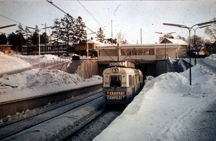 Høkatrikk, linje 3 til Bøler, med Campari reklame i forgrunnen. Her ved Oppsal stasjon.